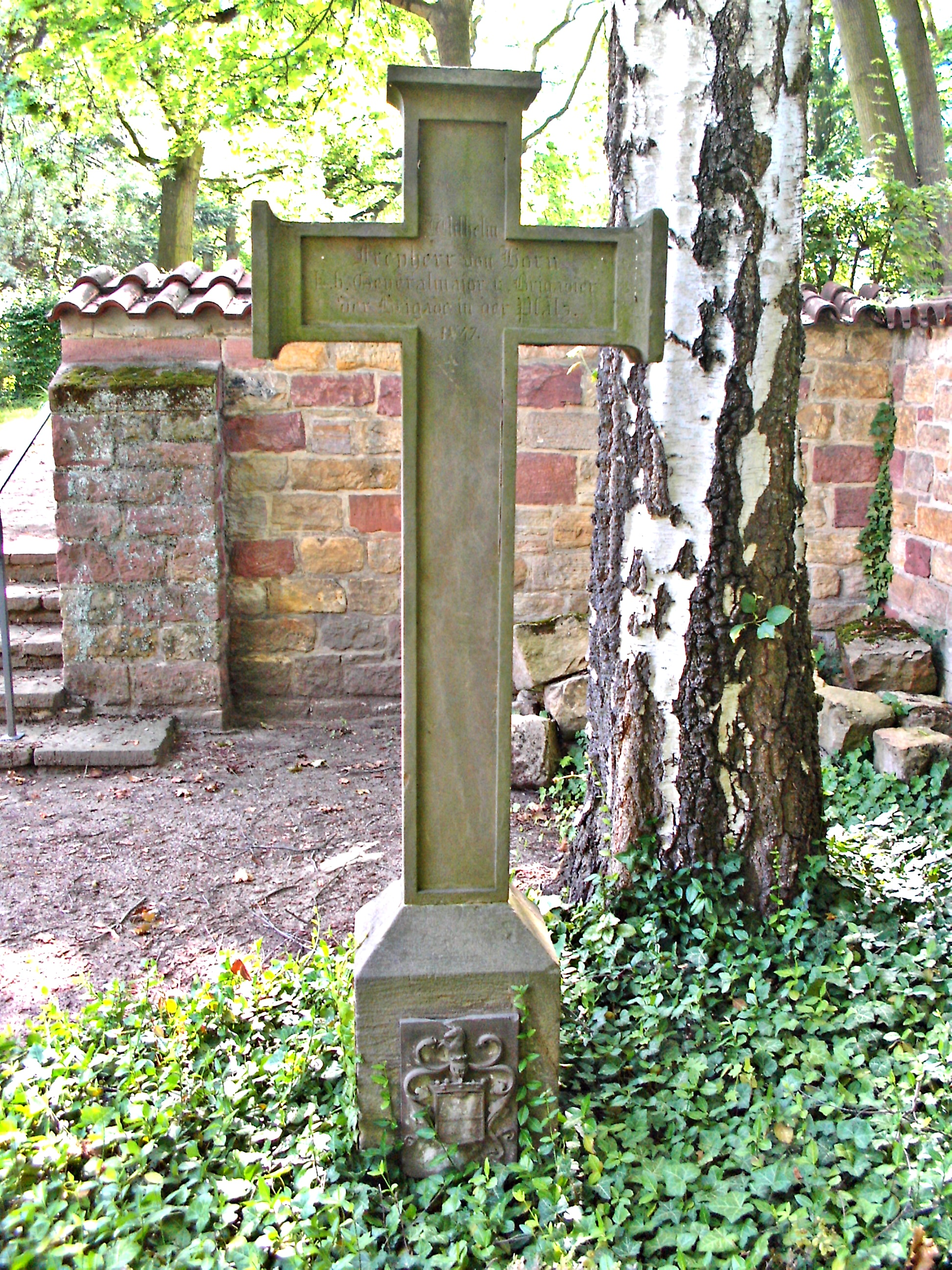 Grabstein bay. General Wilhelm von Horn (1784-1847), Alter Friedhof Speyer